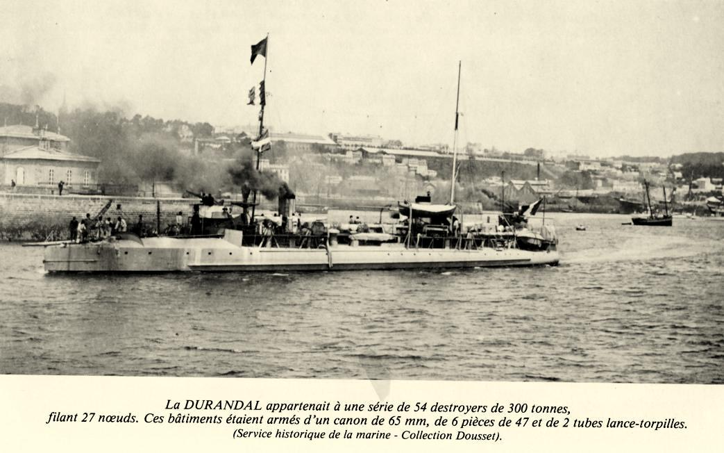 Contre-torpilleur Durandal